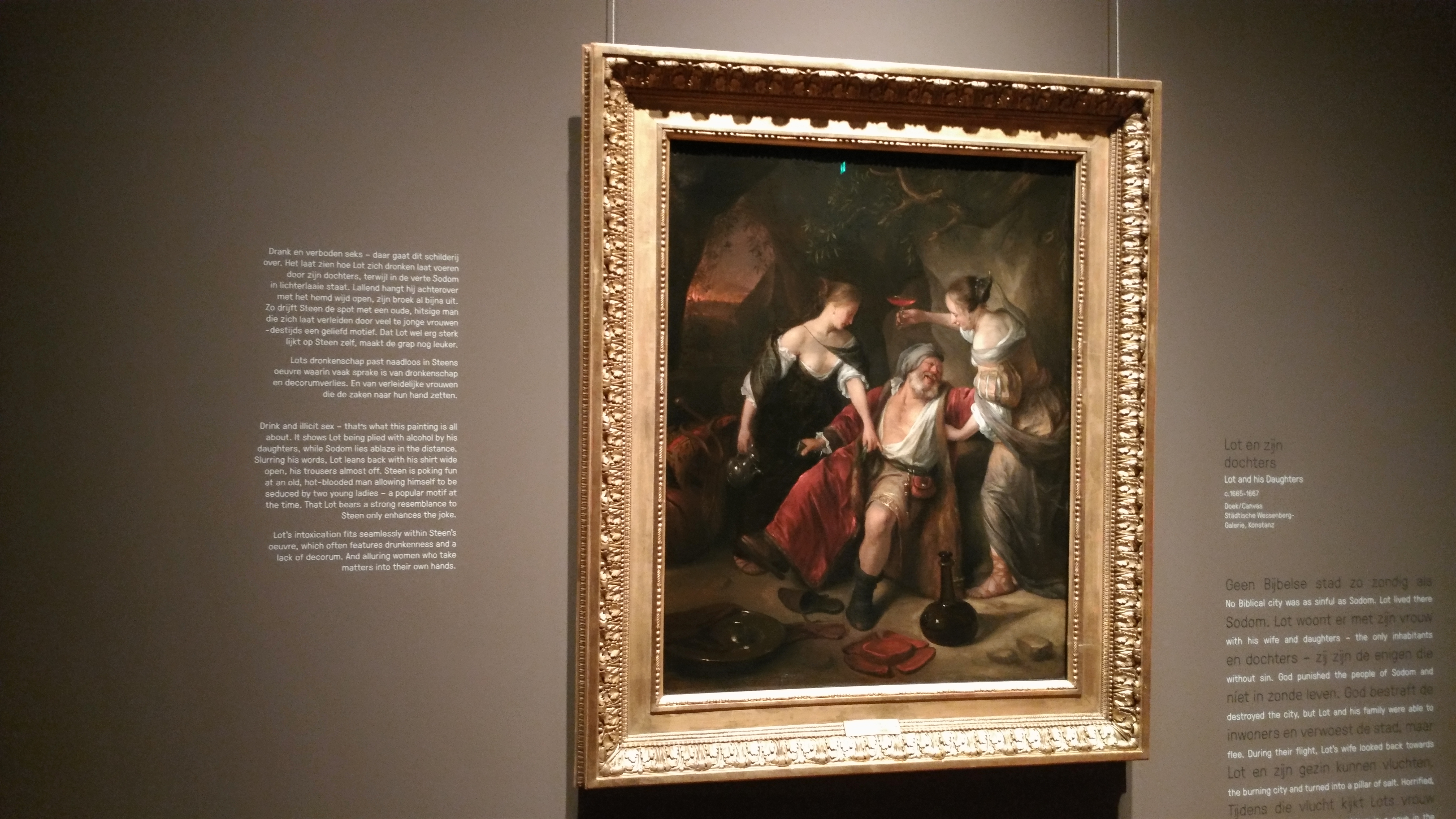 Fotografía de una obra en el museo, con sus comentarios